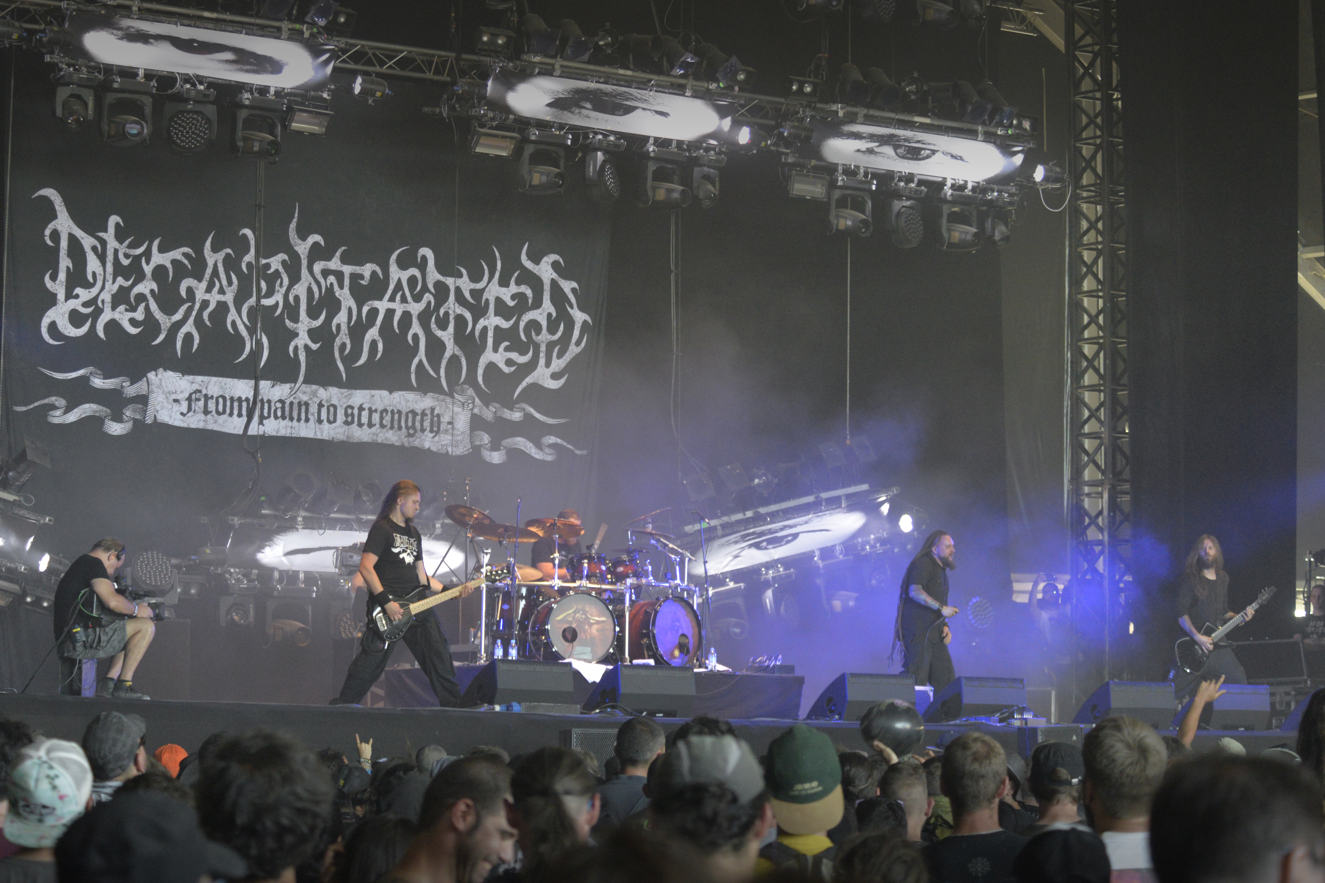 Decapitated, Hellfest 2017.